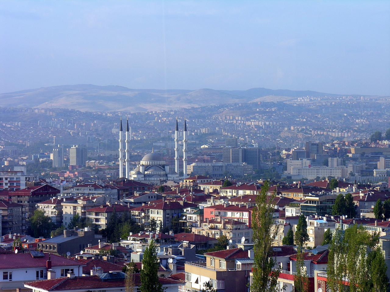 Turkey-1516